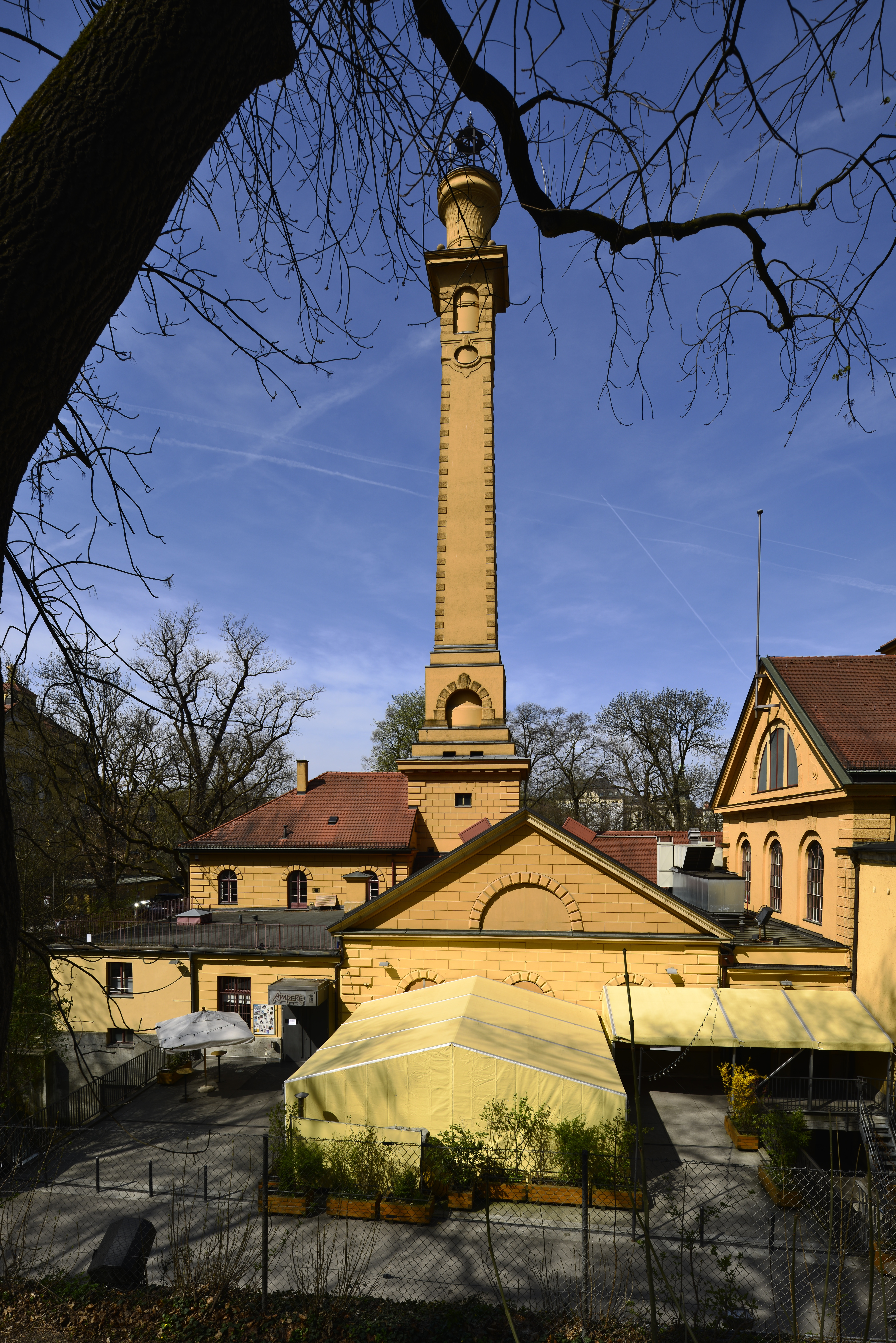 München, Haidhausen, Muffatwerk.